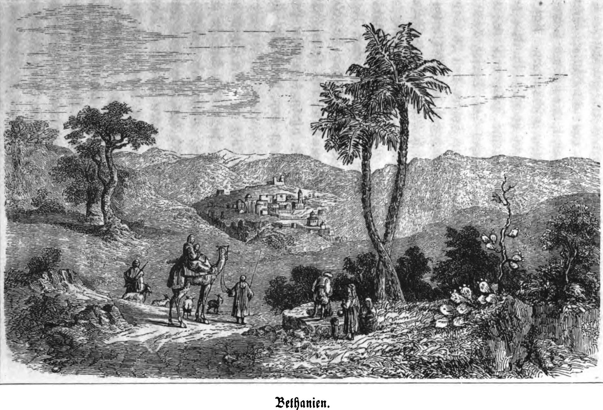 Jerusalem: nach eigener Anschauung und den neuesten Forschungen